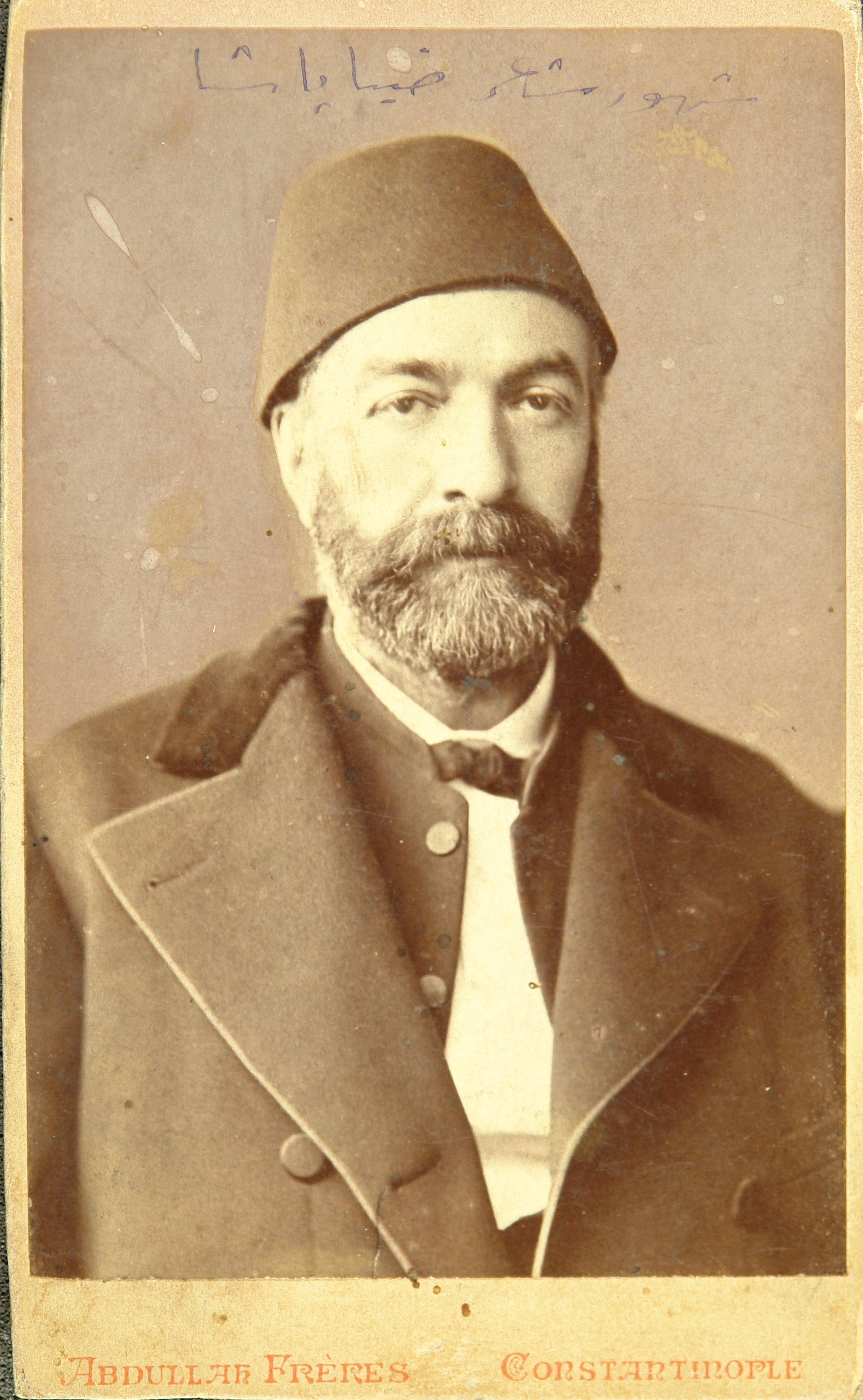 Ziya Paşa